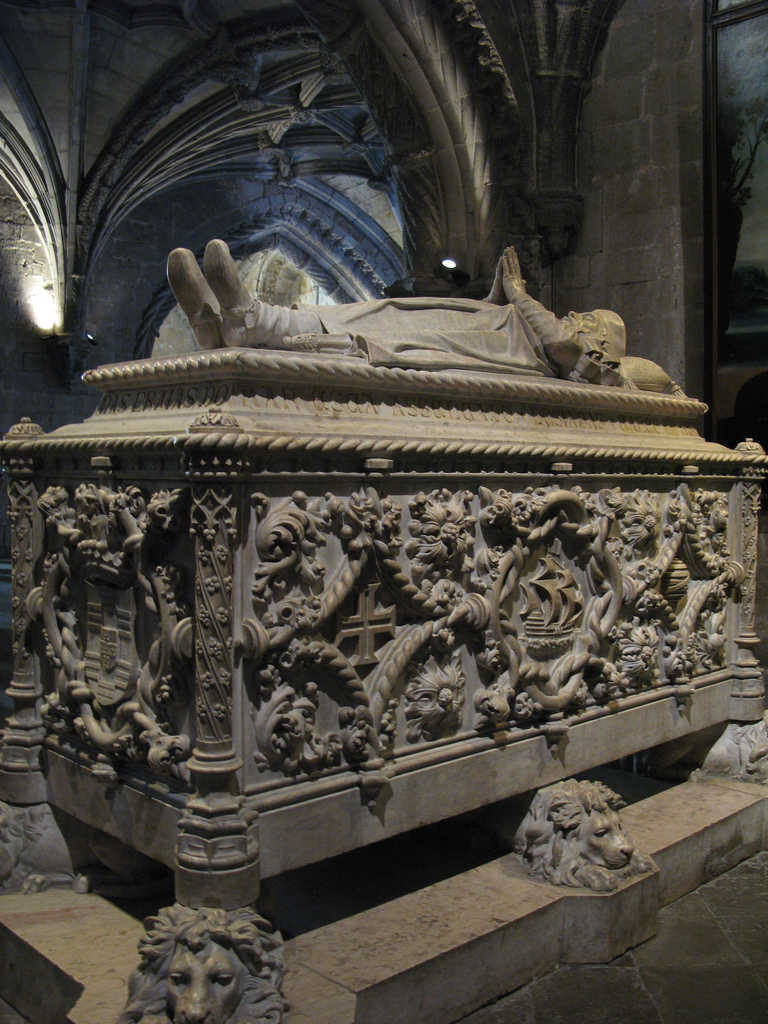 Tomb of Vasco da Gama in Jerónimos Monastery, Lisbon